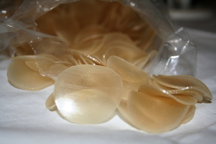 Ongebakken garnalenkroepoek. Eigen werk.